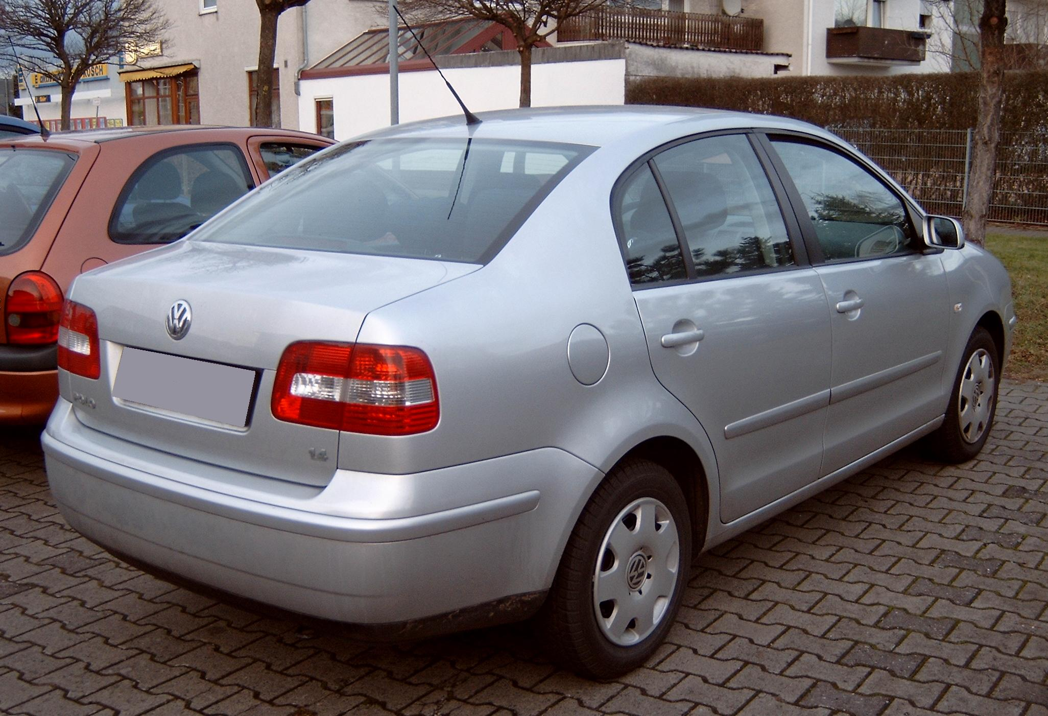 VW Polo